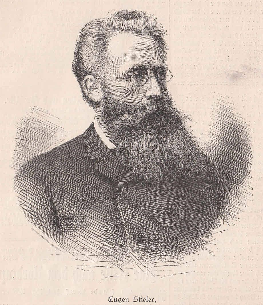 Eugen Stieler, Maler, Holzstich, 12 x 11 cm, 1888.